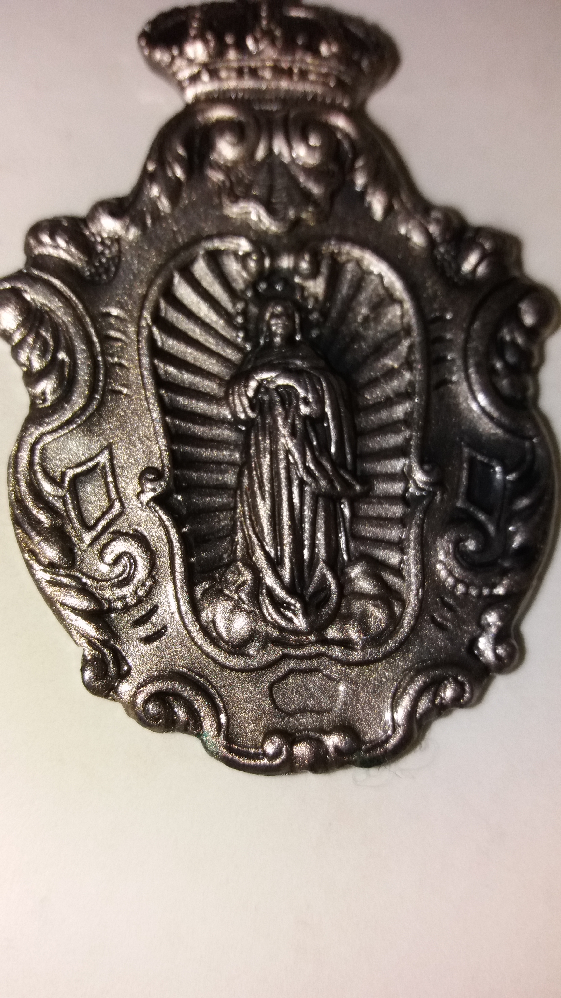 Medalla de la hermandad del Refugio de Zaragoza